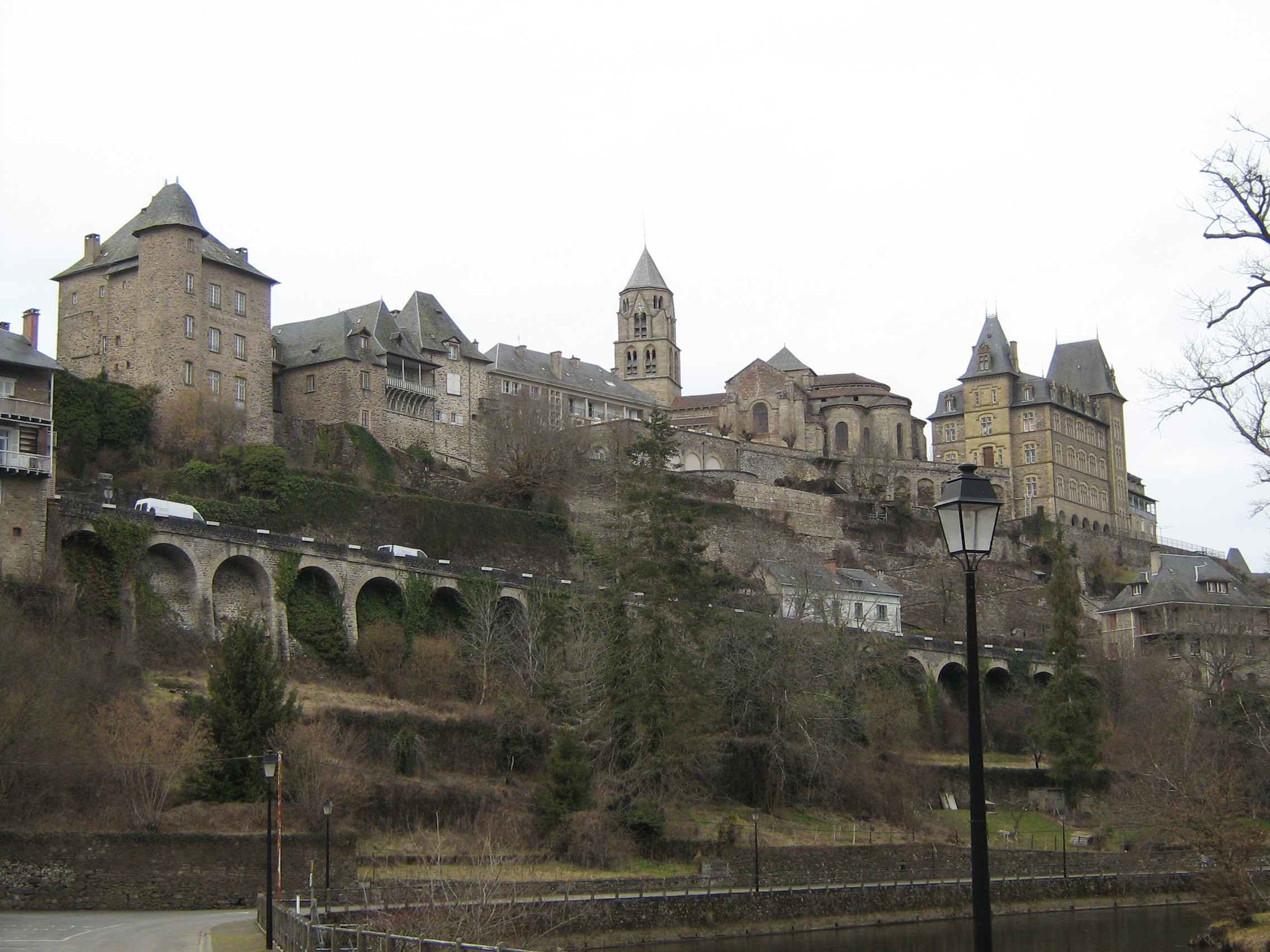 Uzerche surplombant la Vézère.